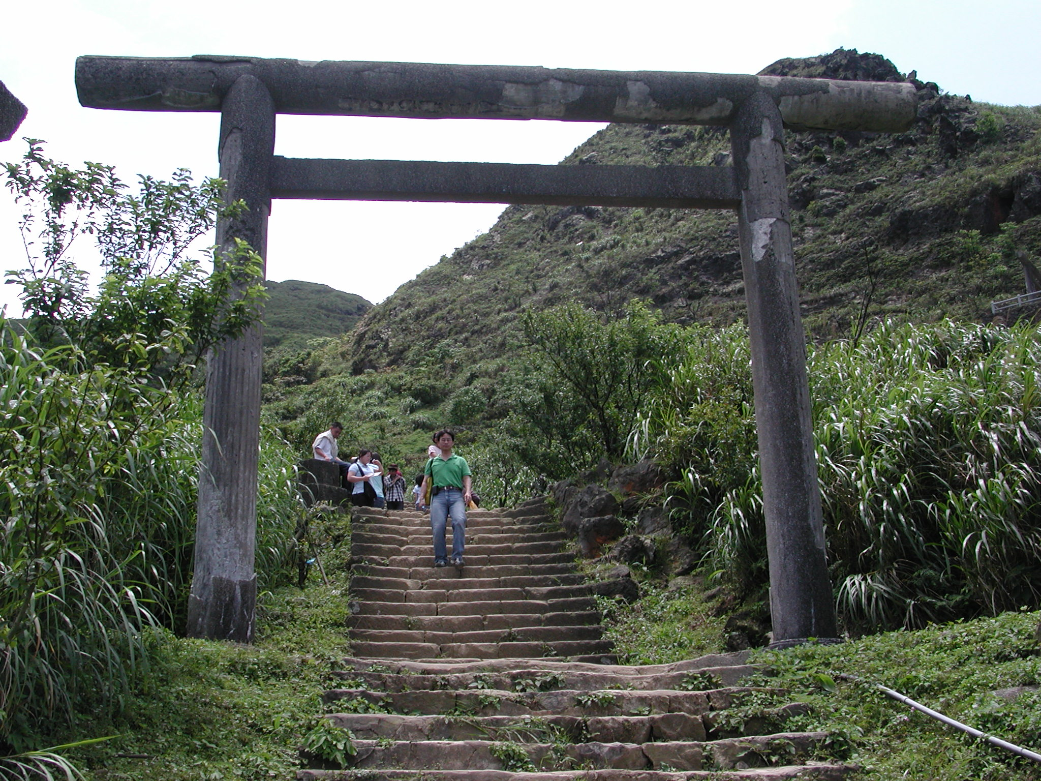 金瓜石黃金神社的石鳥居。Bân-lâm-gú: Kim-kue-tsio̍h N̂g-kim Sîn-siā ê tsio̍h-niáu-ki. 金瓜石黃金神社的石鳥居。